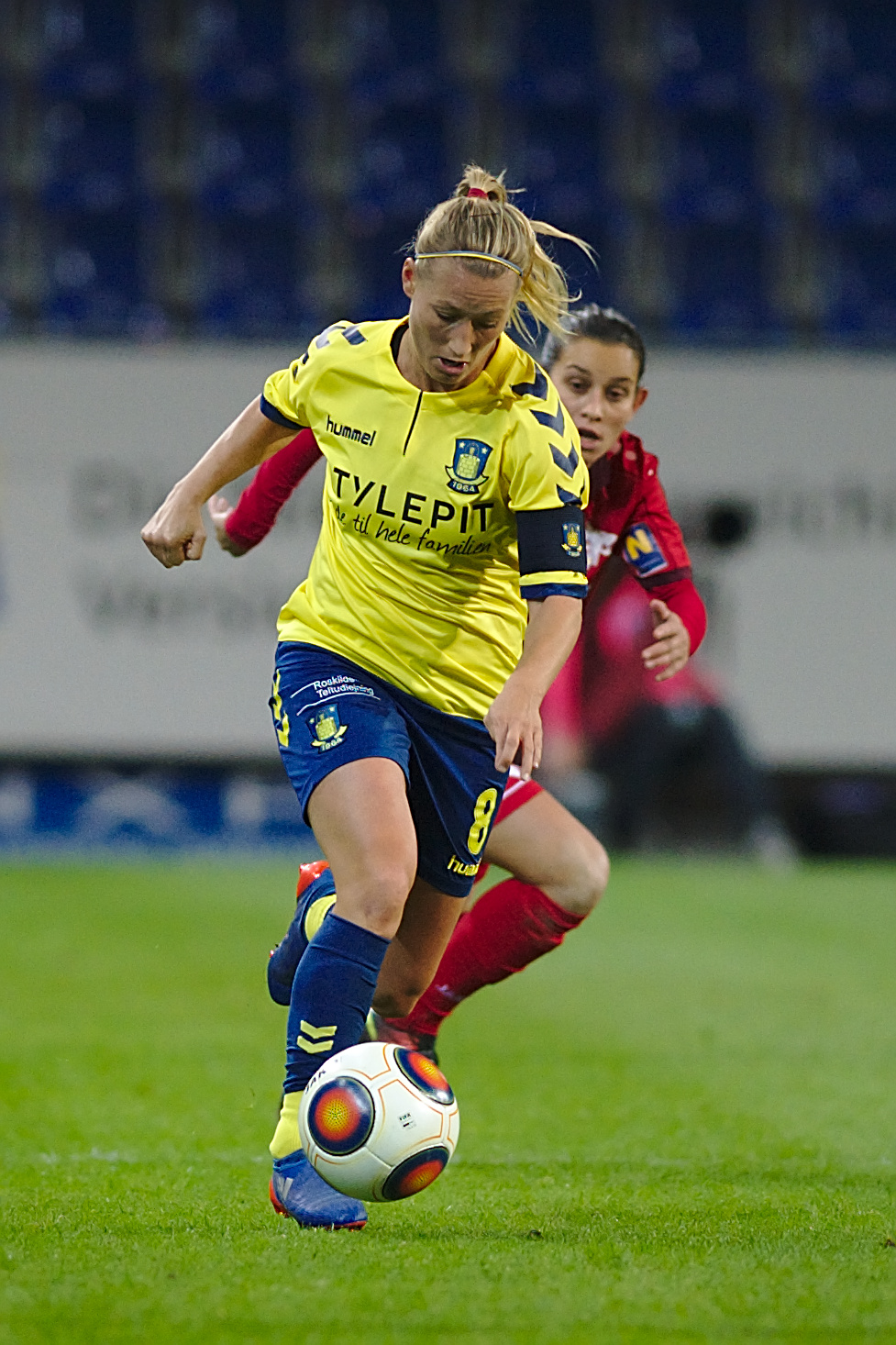 UEFA Women's Champions League Round of 32, SKN St. Pölten vs Brøndby IF am 5.10.2016. Bild zeigt Theresa Nielsen (Brøndby).